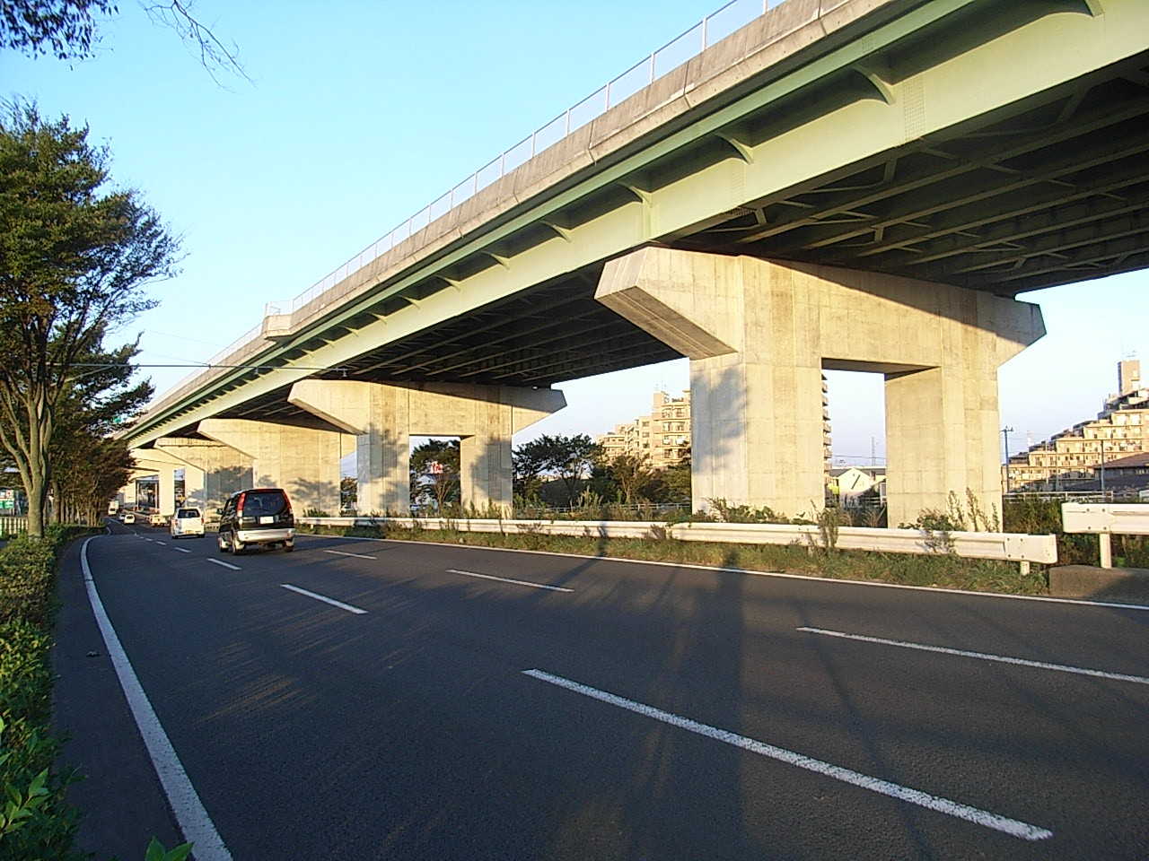 Miyagi Prefectural Road 23, Sendai-Shiogama Line. Sendai, Miyagi prefecture, Japan.